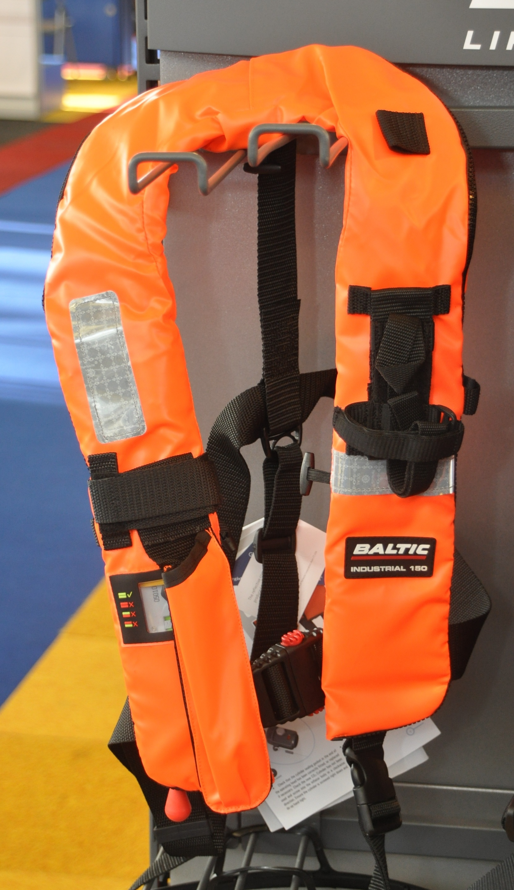 Scheepsmaterialen op de METS 2011 in de RAI te Amsterdam